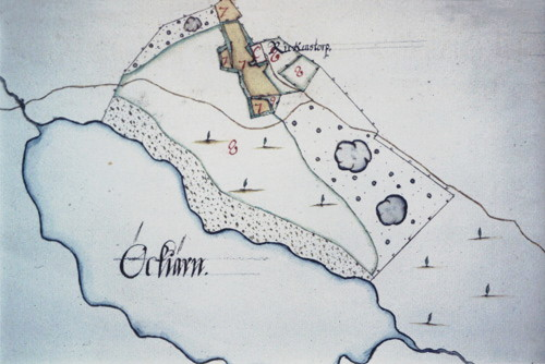 Rikkenstorp, arealavmätning 1702